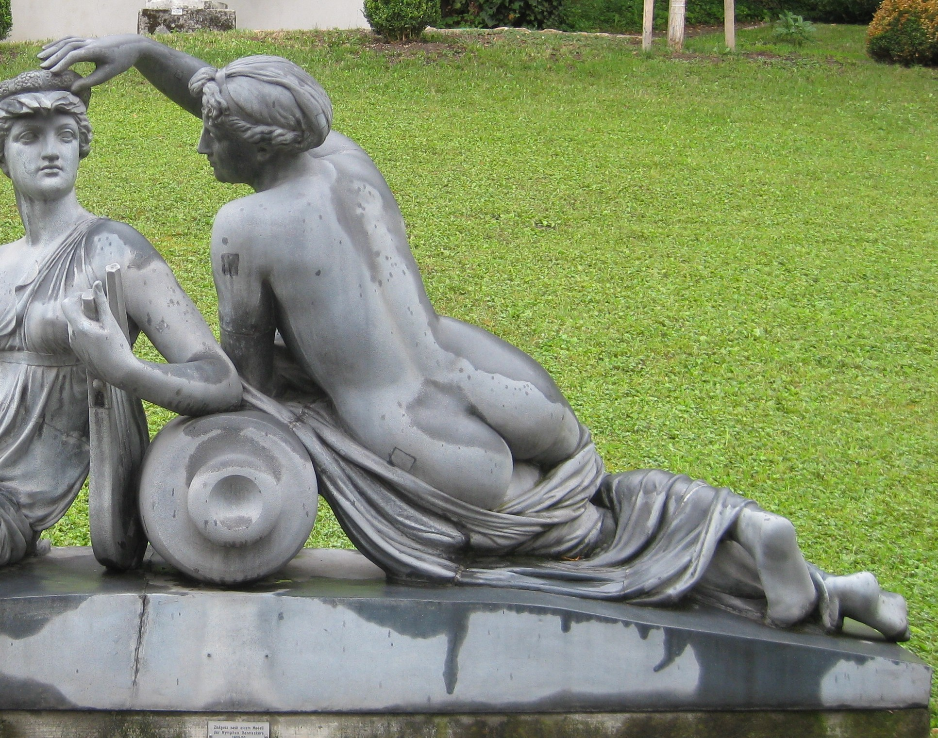 Johann Heinrich Dannecker: Wasser- und Wiesennymphe, Detail: Wiesennymphe. Zinkguss von NN (um 1933), Stuttgart, Städtisches Lapidarium